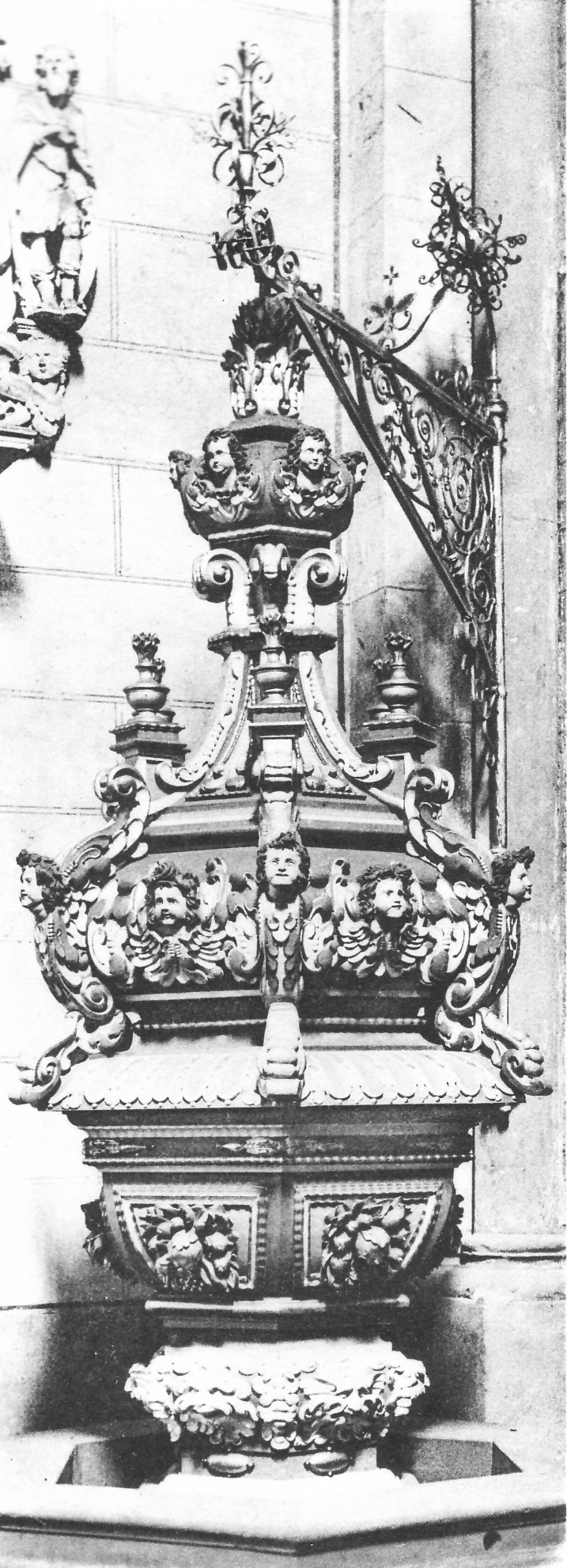 Dom Minden